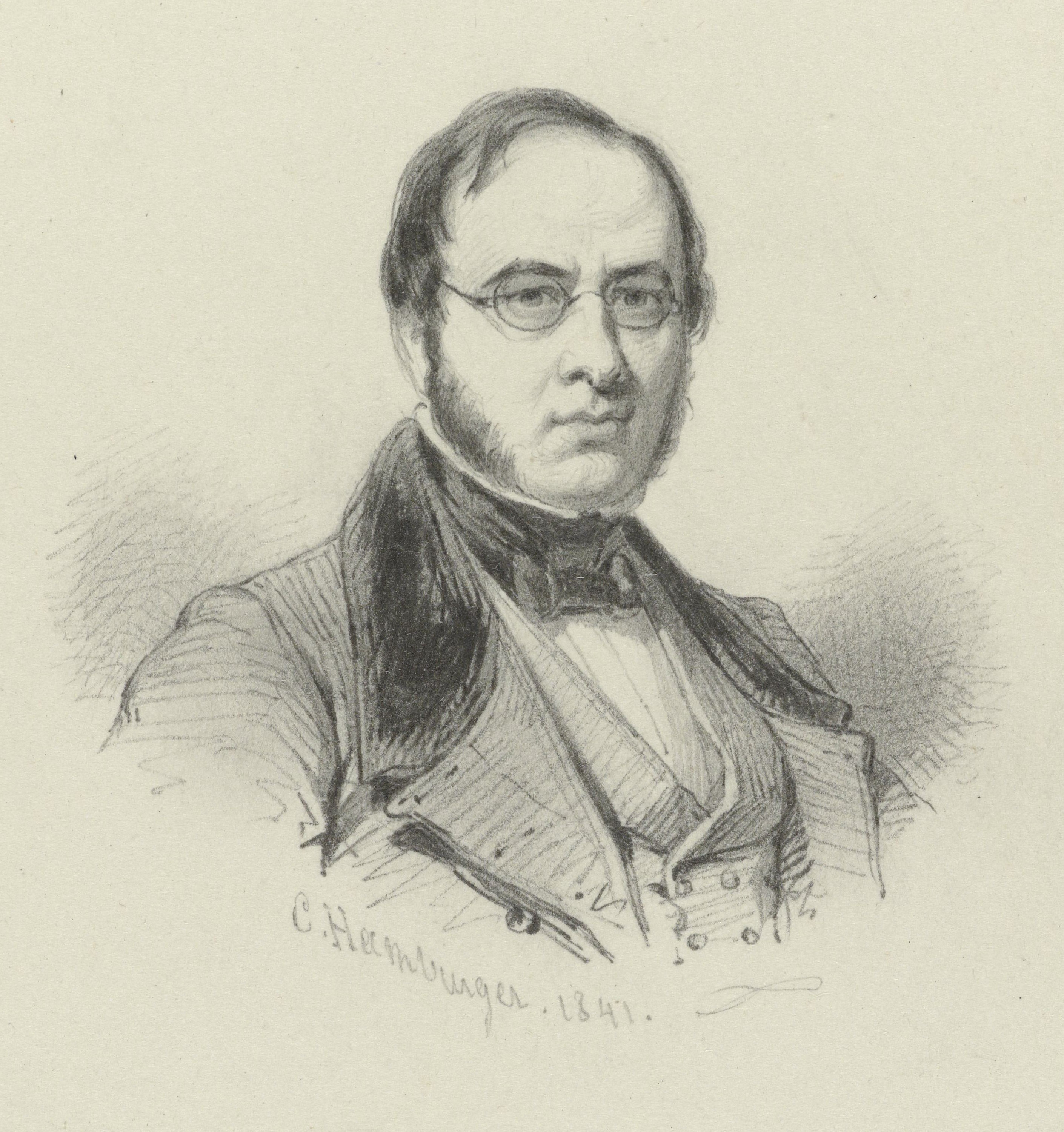 Portret van de graveur en etser André Benoit Barreau Taurel.